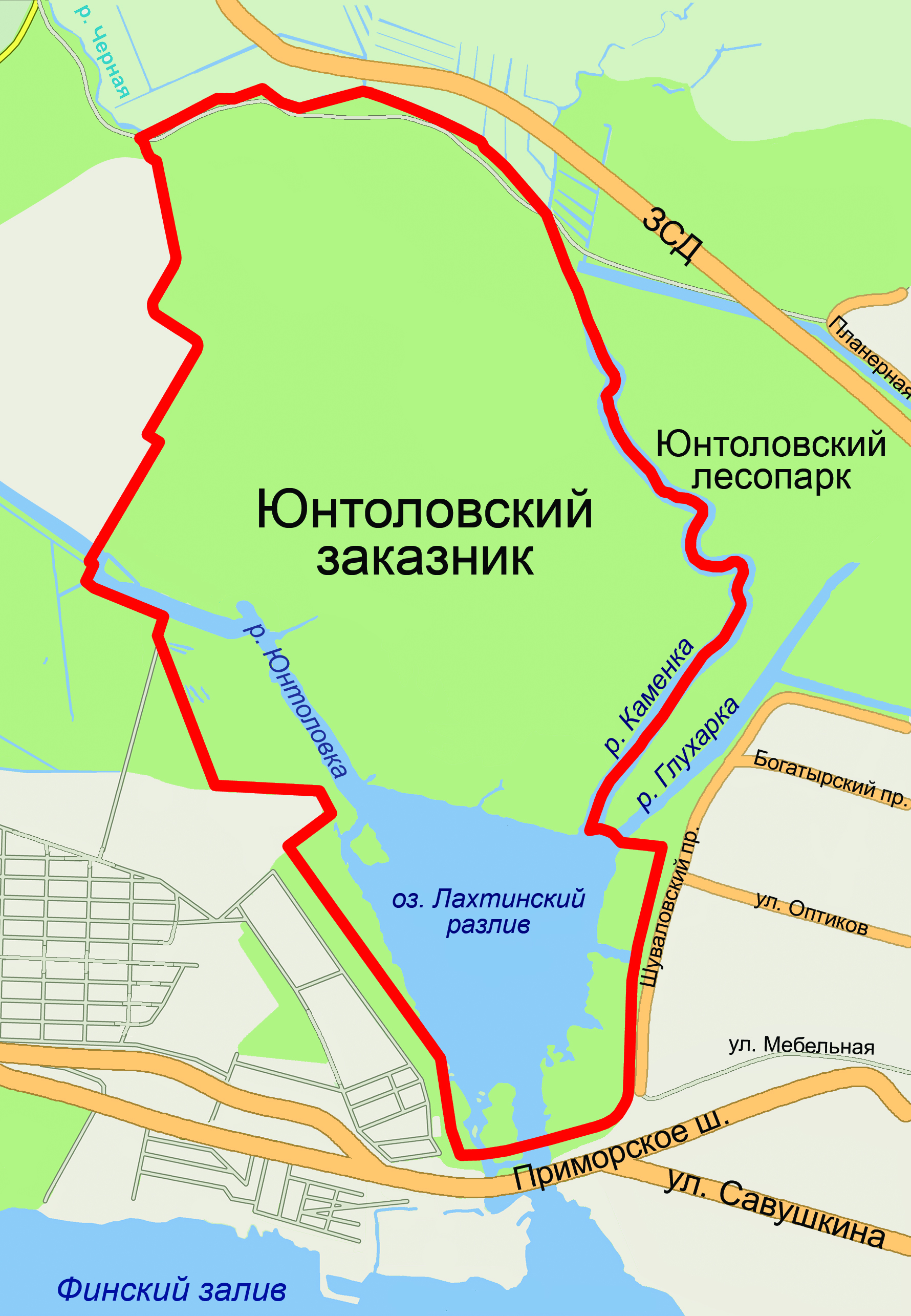 Карта границ заказника "Юнтоловский"